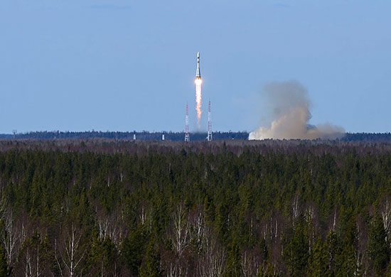 Пуск ракеты-носителя «Союз-2» с космодрома Плесецк